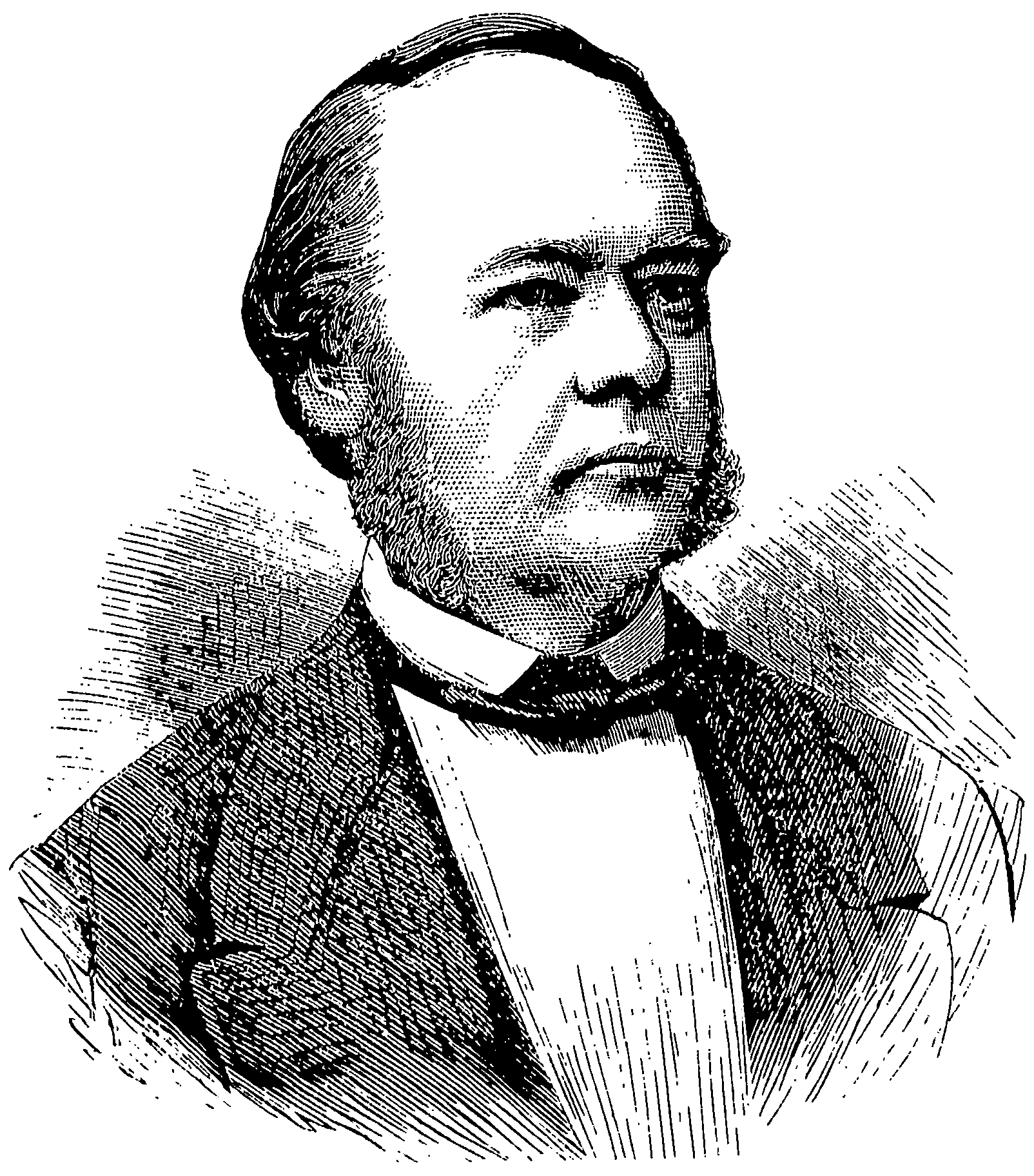 Den norske juristen og politikeren Ole Richter.